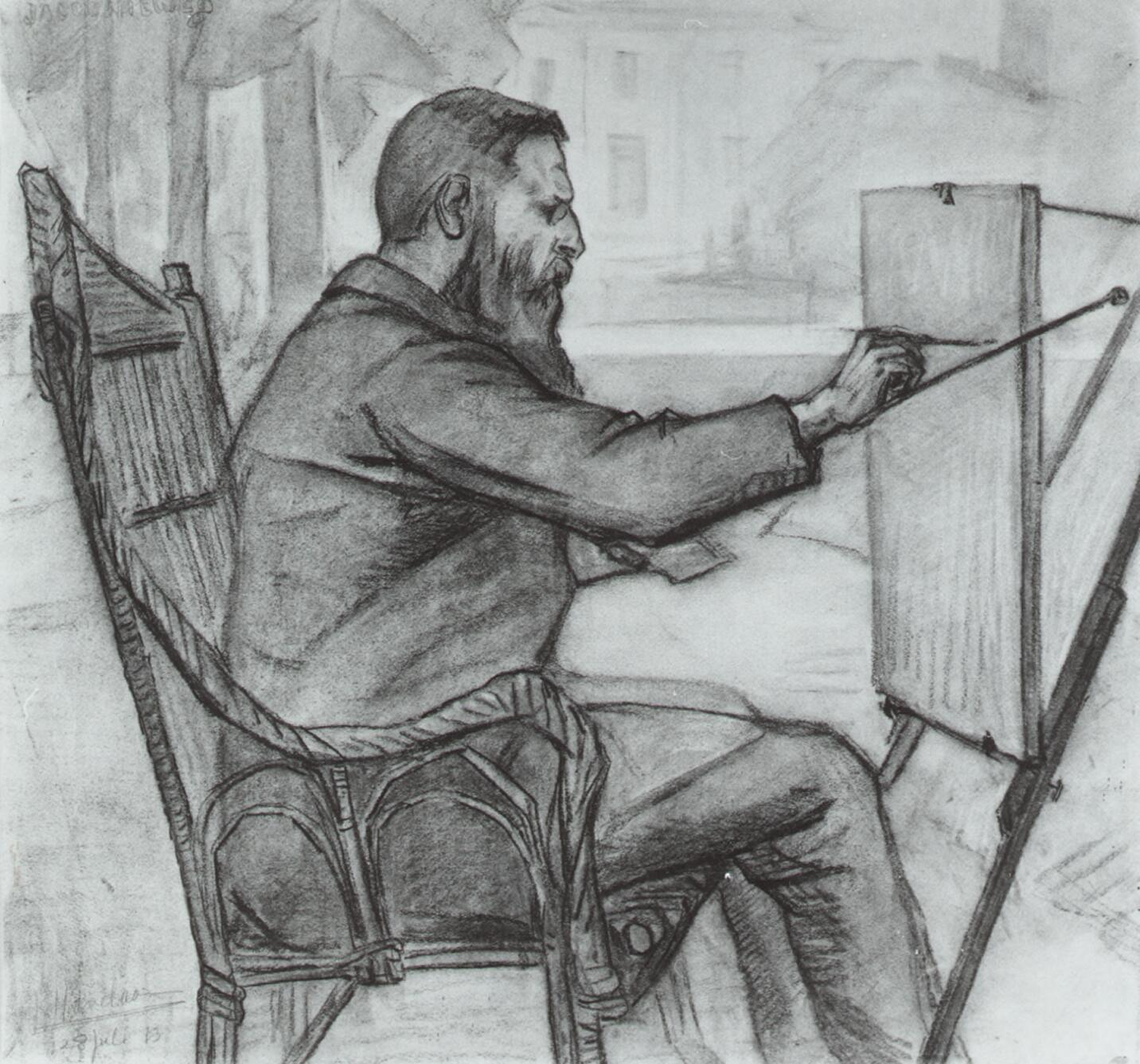 uitsnede van een portret van Jakob Nieweg (1877-1955) door Just Havelaar (1880-1930)